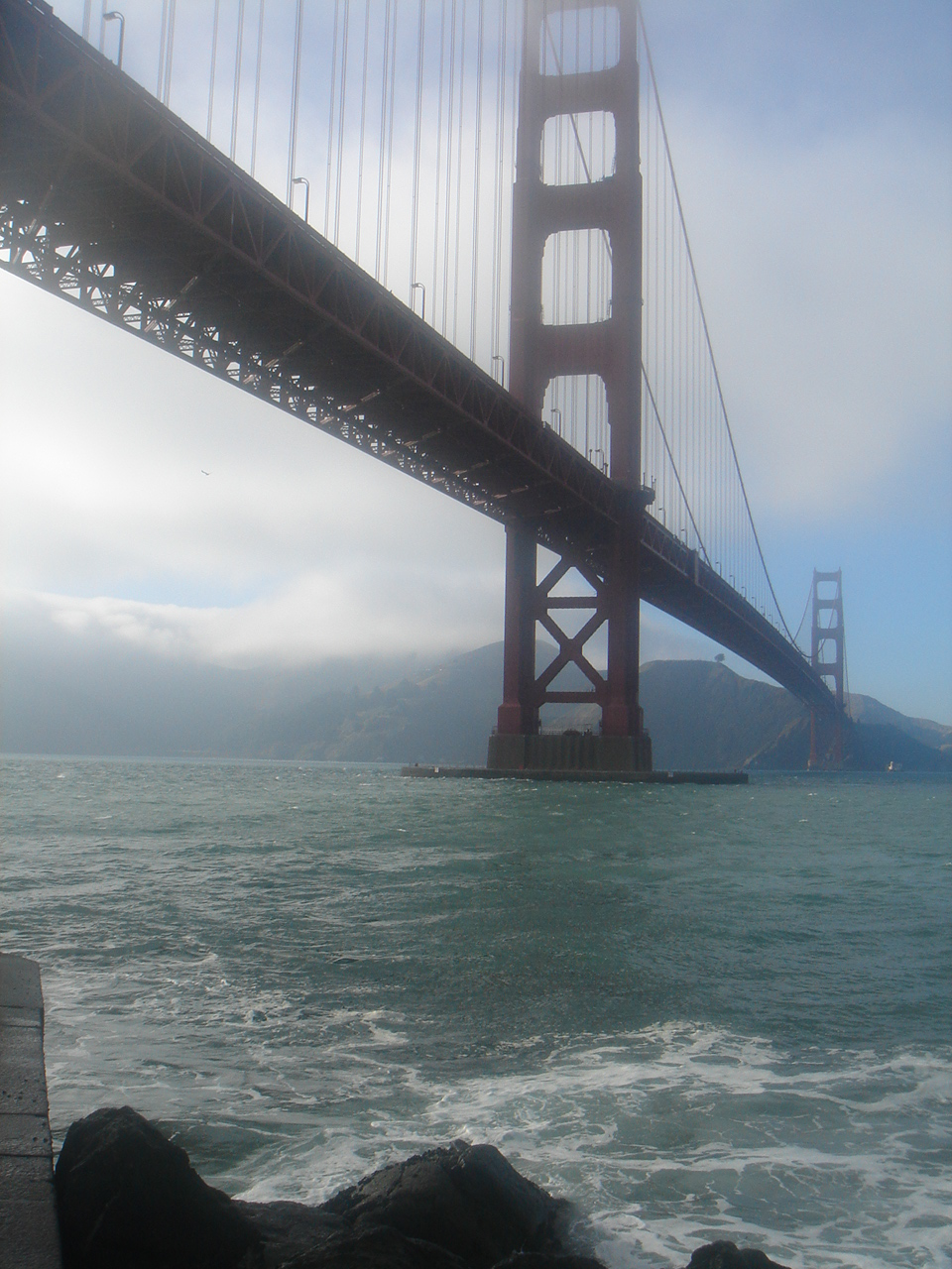 Photo du Golden gate prise par moi même en aout 2005